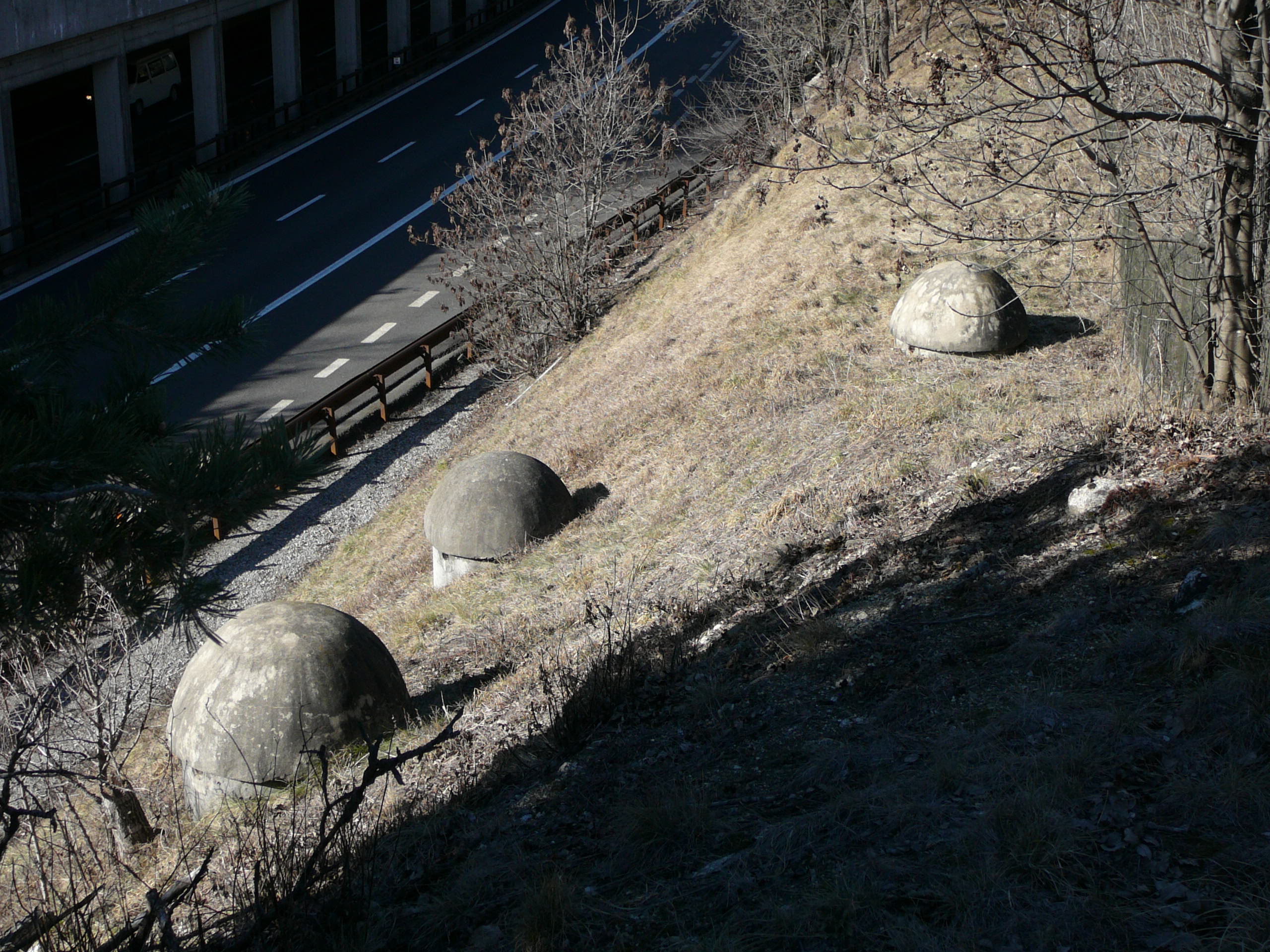 Opera I Col dei Bovi - cupole aerazione